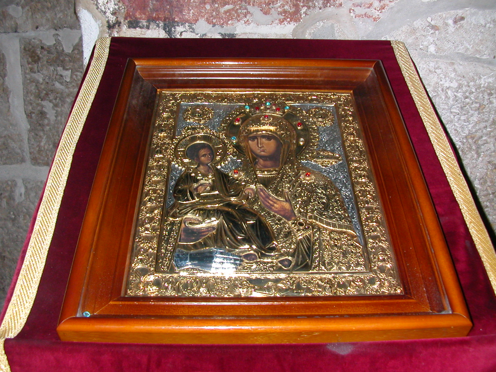 Unutrašnjost manastira Visoki Dečani, autor Nikostrat Saronski